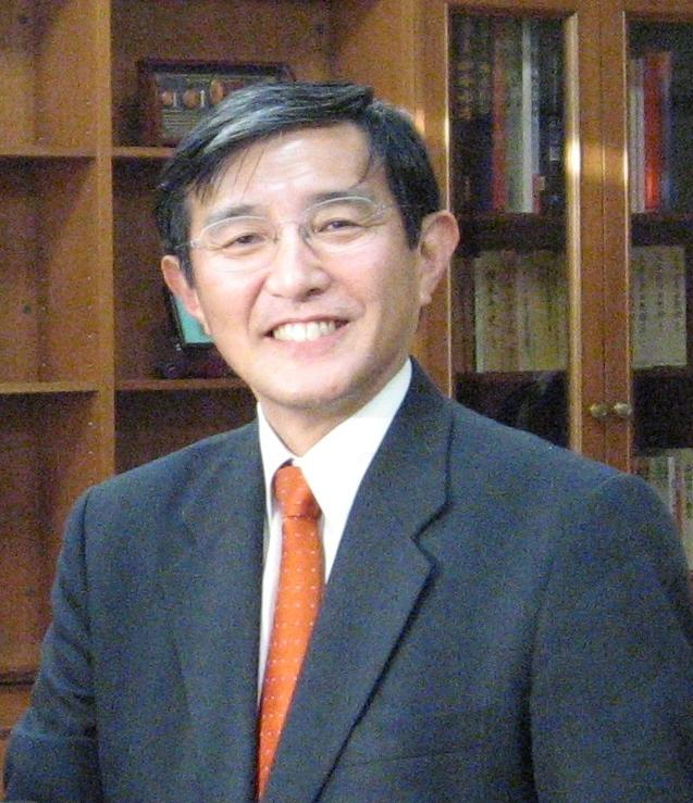 Governor of Wakayama Yoshinobu Nisaka(仁坂吉伸).